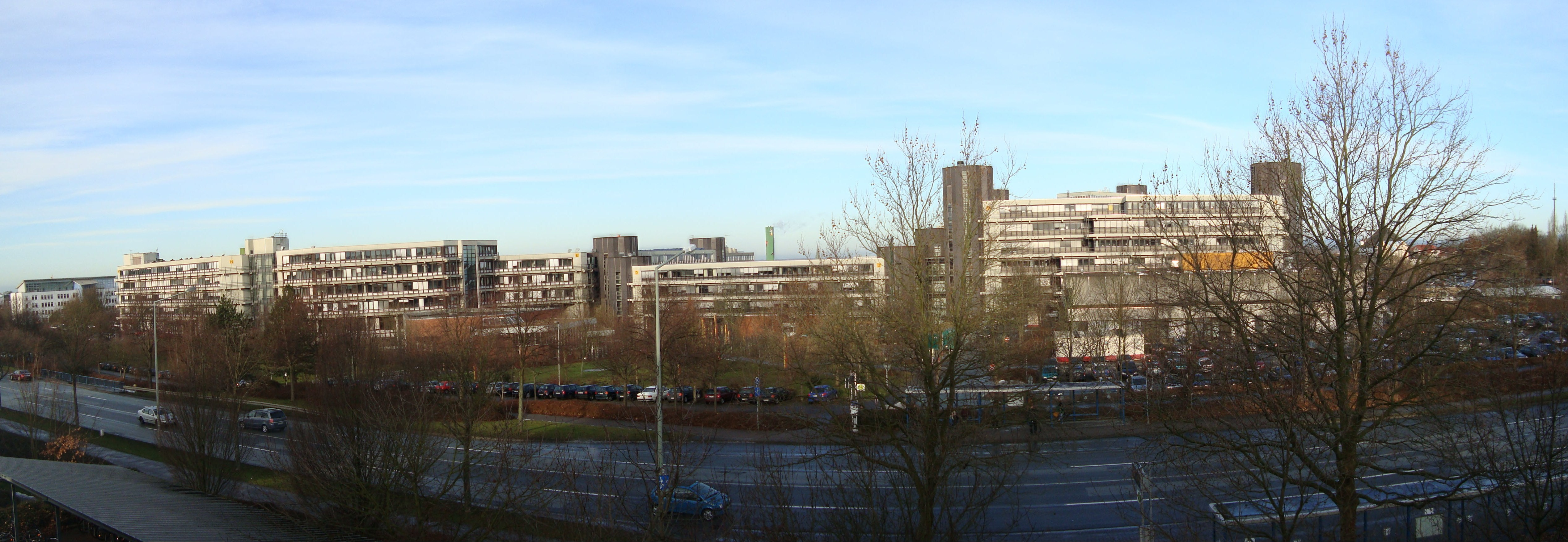 Universität Paderborn Panorama